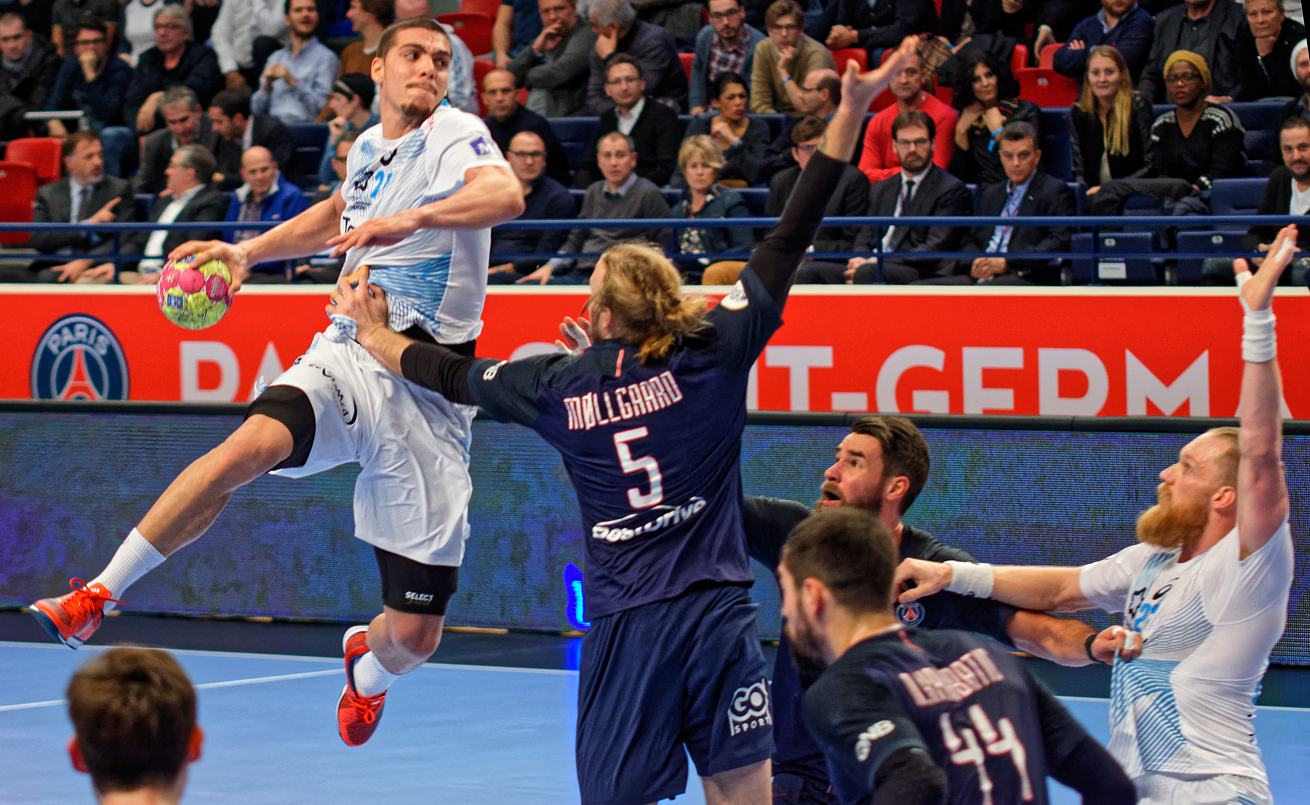 Rencontre de championnat entre le PSG et Montpellier. A Coubertin le 23 novembre 2016.